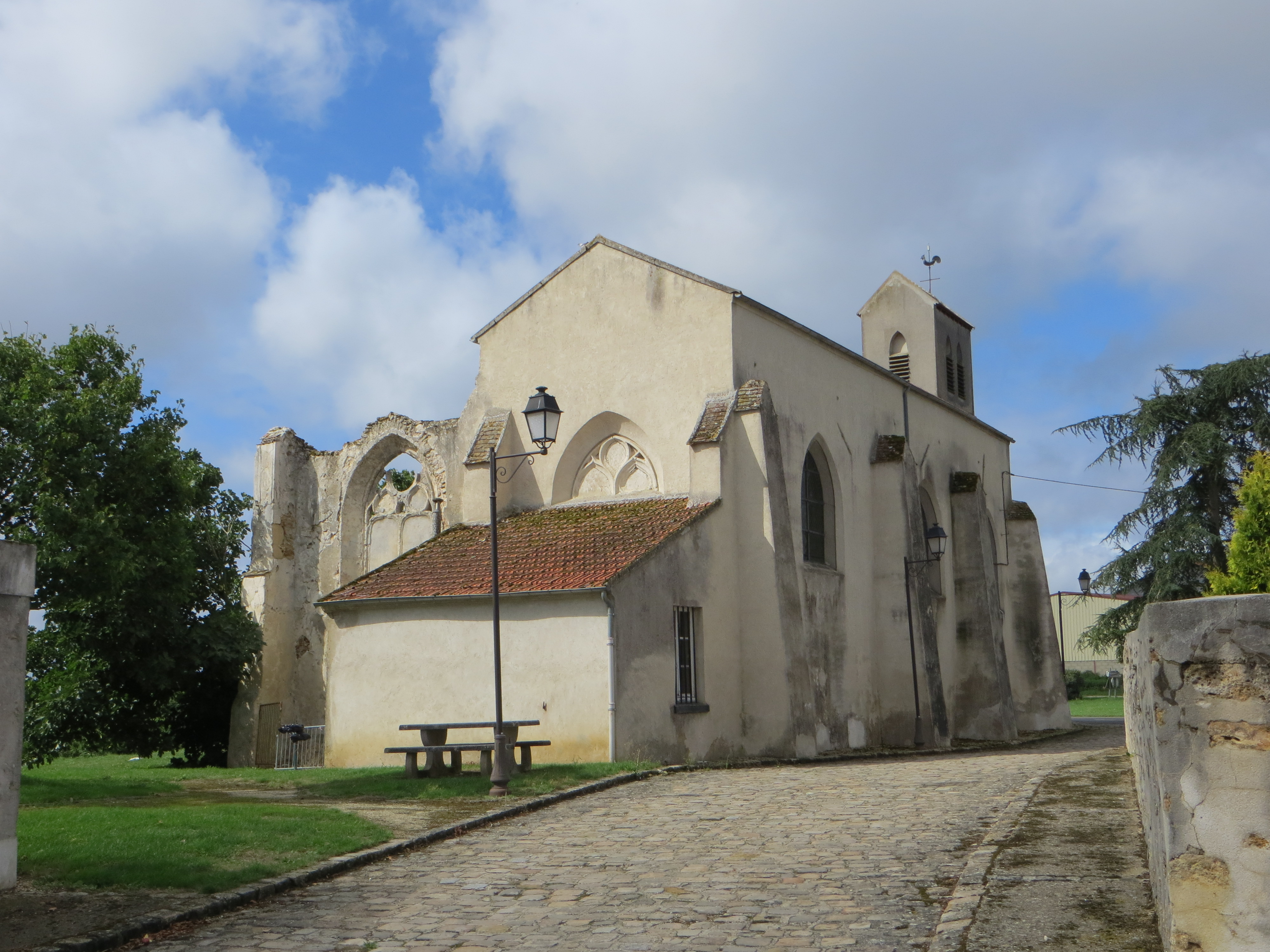 Vue de l'église